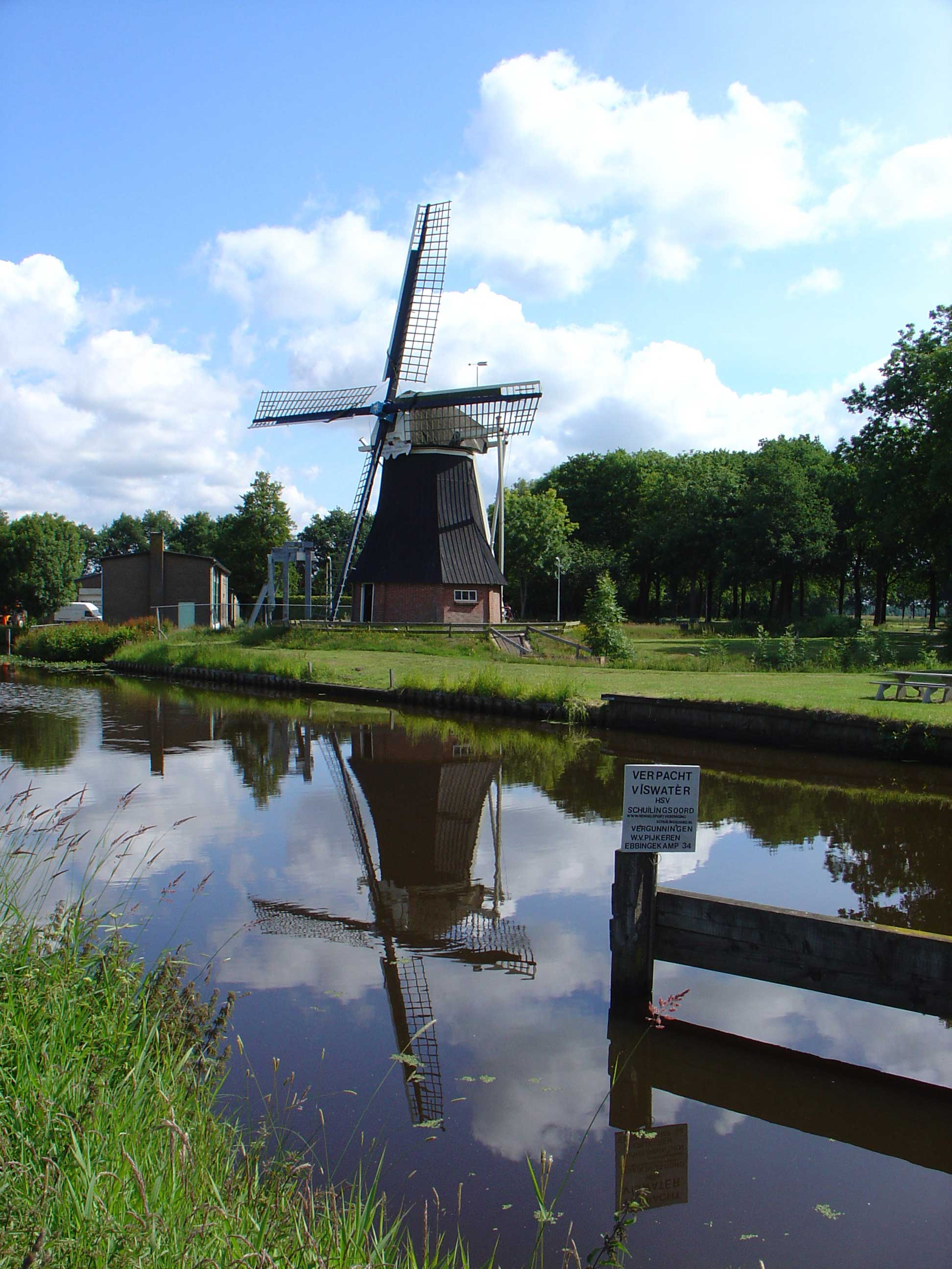 molen De Boezemvriend in De Groeve